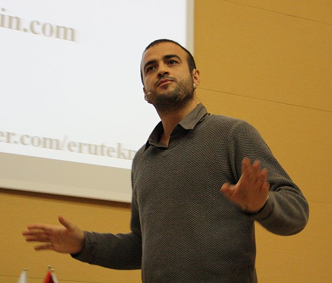 Tamer Şahin'in konferans konuşmasında çekilen resimdir. Telif sorunu yoktur.